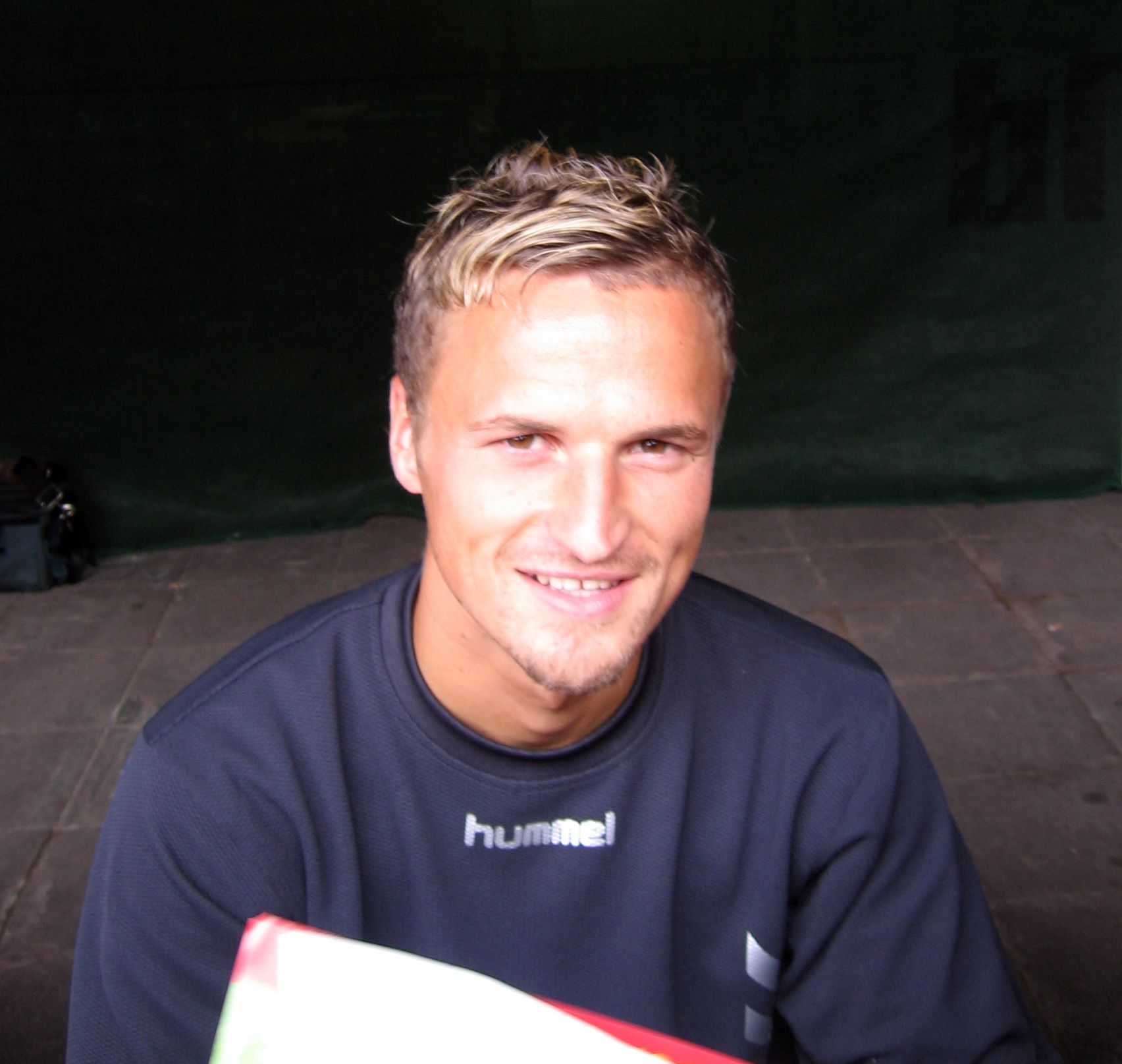 Marco Löring